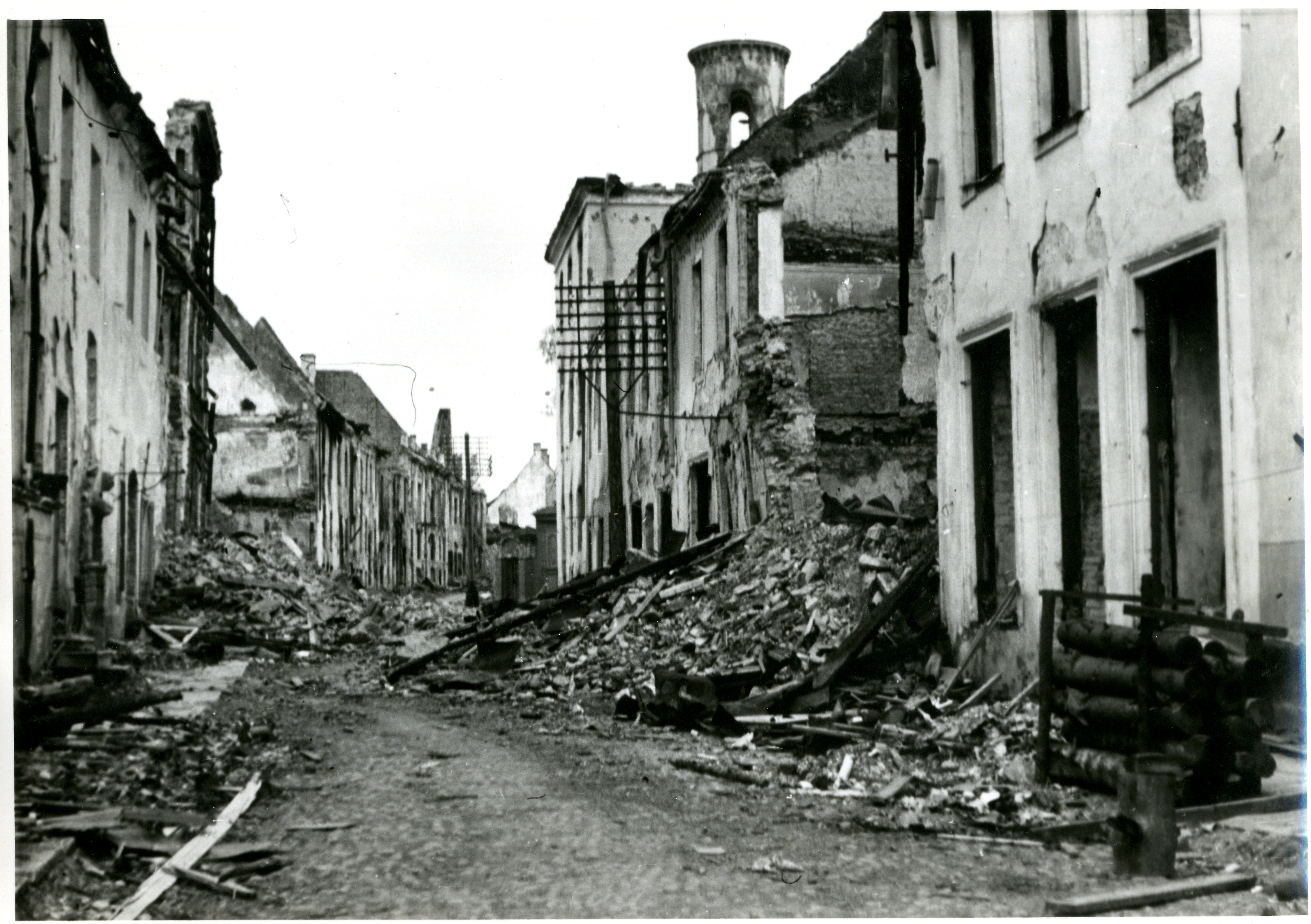 Bildet er hentet fra Arkivverket. Narva by etter russisk bombing. Foto tilhørende landssviksak, domsnummer 2506, Oslo Politikammer. Arkivinstitusjon : Riksarkivet Arkivnavn : Landssvikarkivet Sted : Estland, Ukjent, Ukjent, Narva Emneord: Narvafronten, Ruiner, Krig, Andre verdenskrig, 2. verdenskrig Avbildet: Ukjent